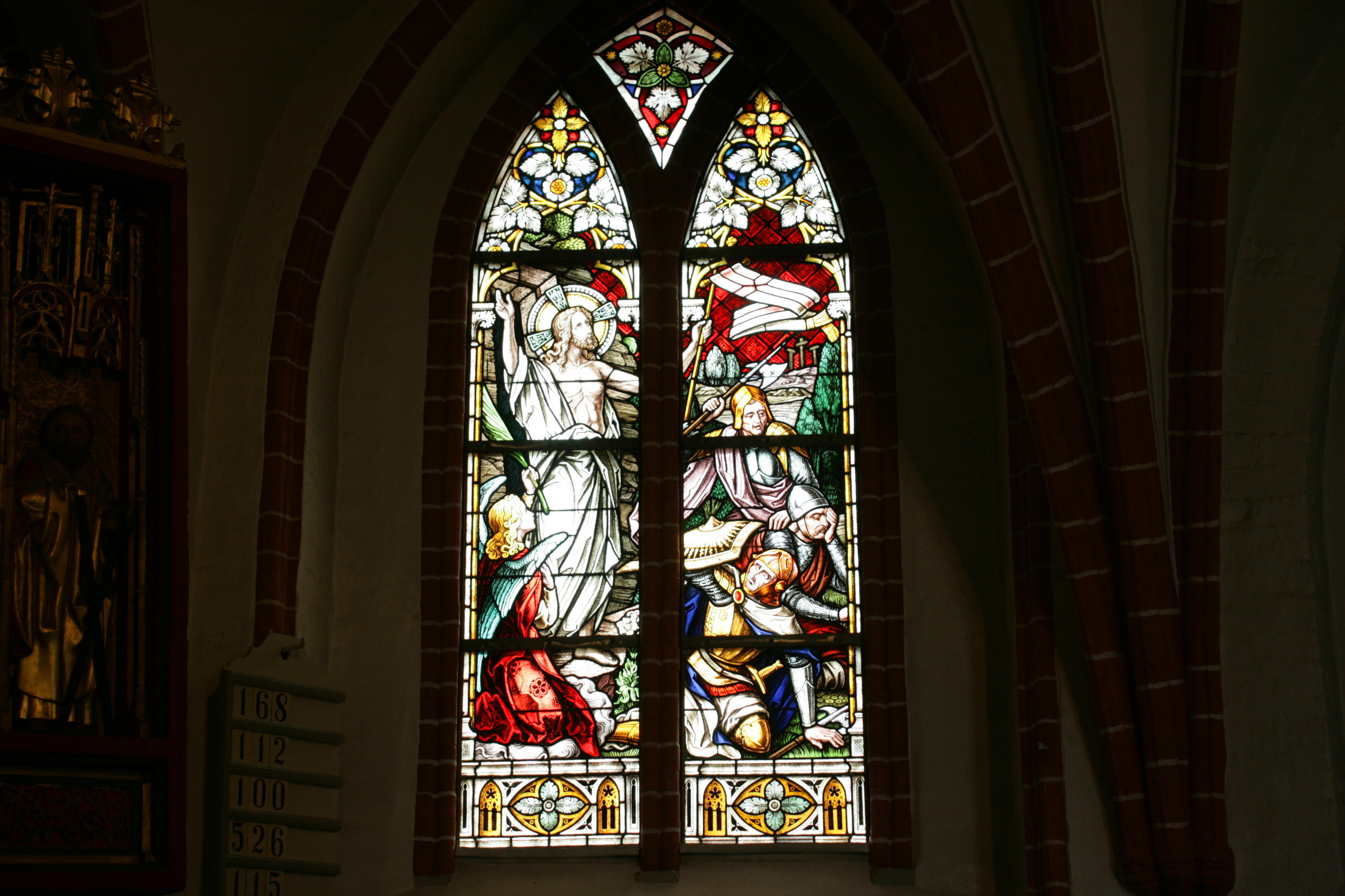 St. Georg, Wriedeler Straße im Ortsteil Hanstedt I von Hanstedt (Landkreis Uelzen)